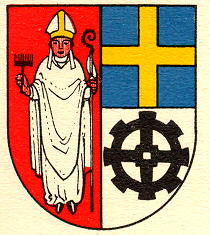 Wappen von Saint-Blaise Kanton Neuenburg Schweiz